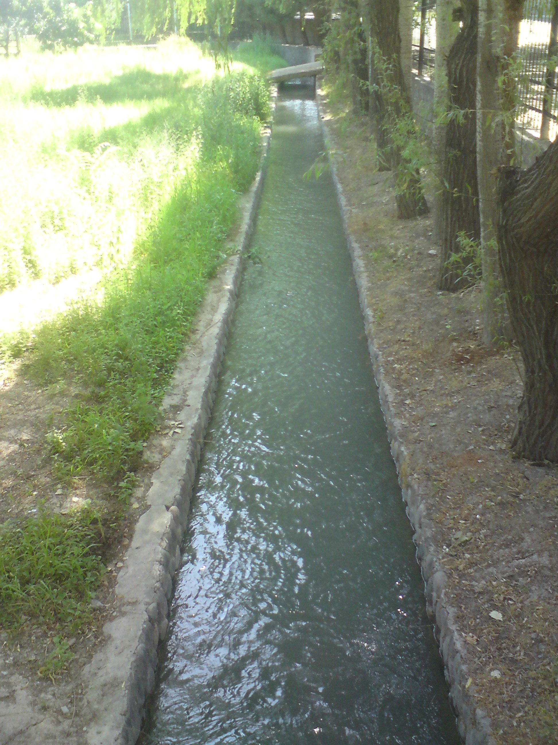 Канал (арык) Навза, отвод Анхора, Чиланзарский район, город Ташкент